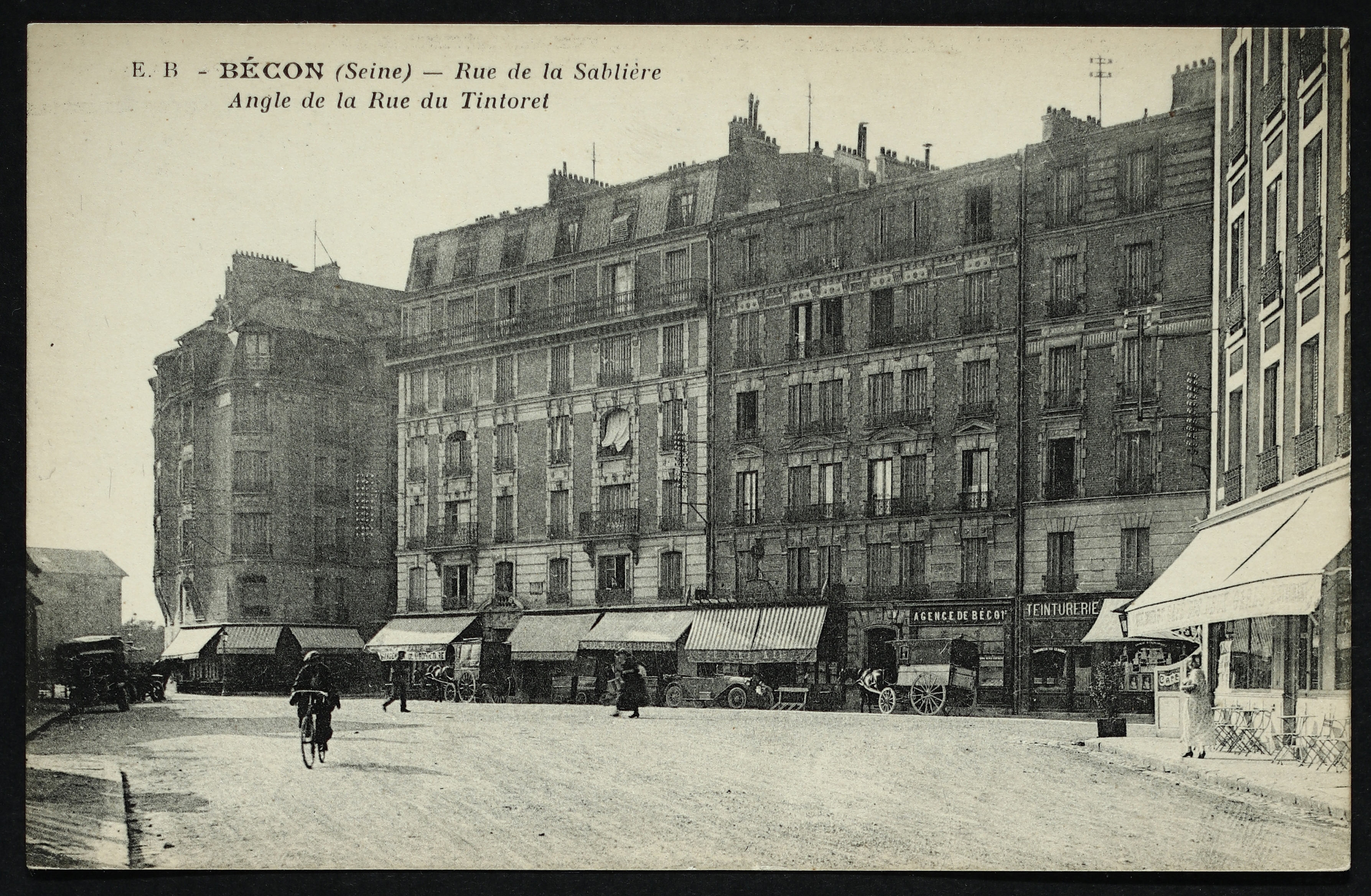 Rue de la Sablière - Angle de la Rue du Tintoret - 9FI/COU_48